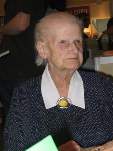 Prof. Anna Świderkówna (1925-2008)